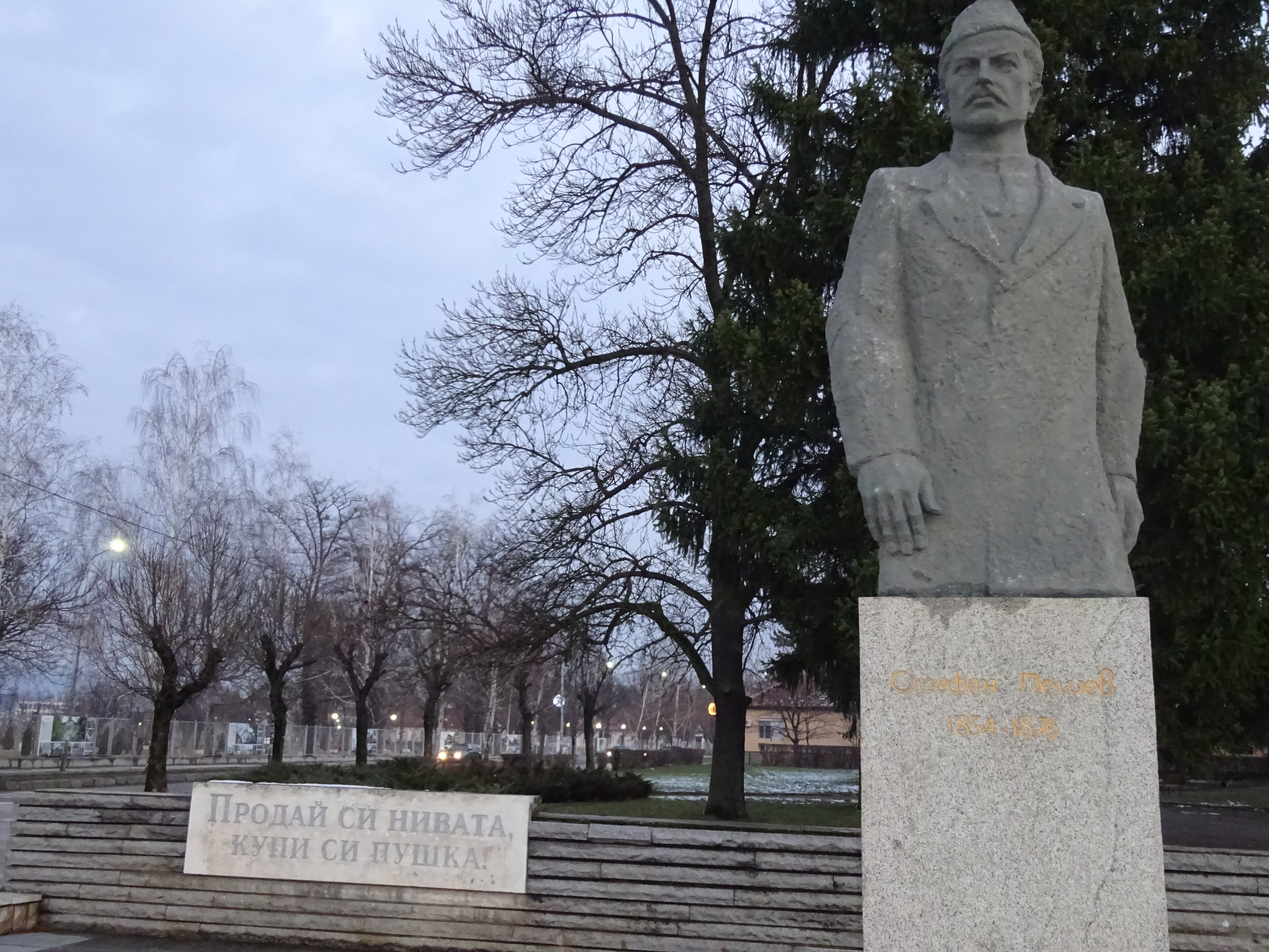 Паметник на Стефан Пешев, парк на революционните дейци, Севлиево